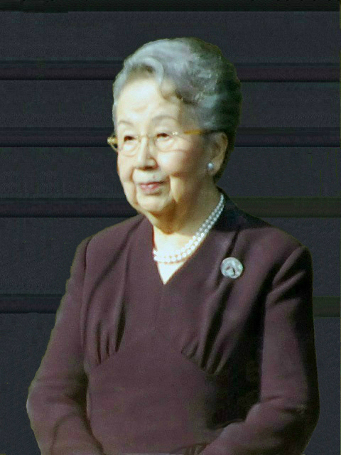 新年一般参賀における、三笠宮妃百合子(Princess Yuriko)